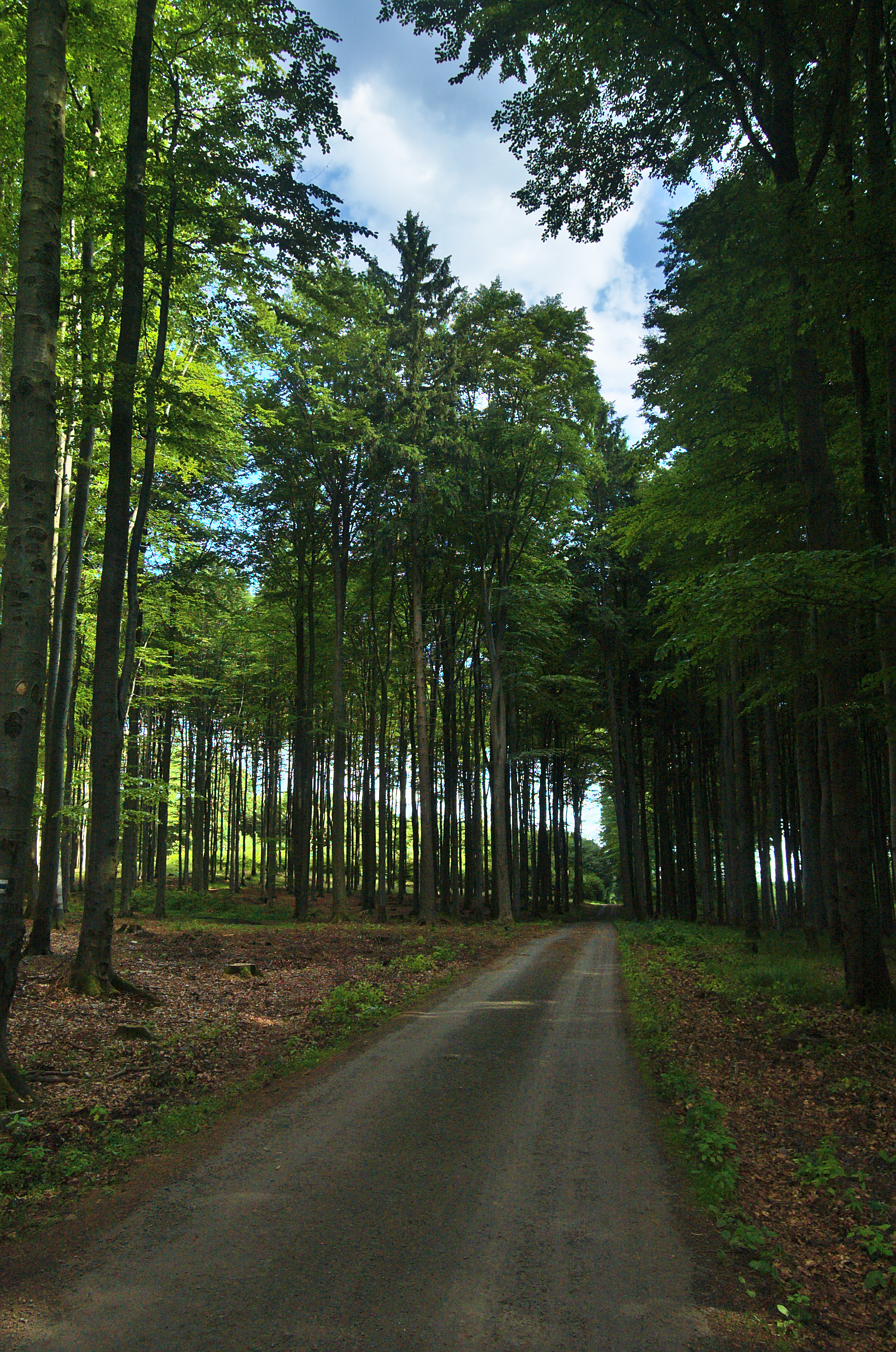 Přírodní rezervace Skály, Protivanov, okres Prostějov